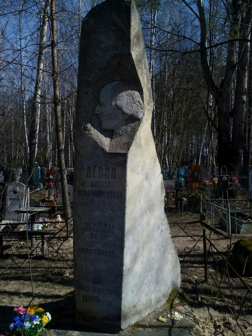 Памятник Михаи́лу Константи́новичу Лёвину